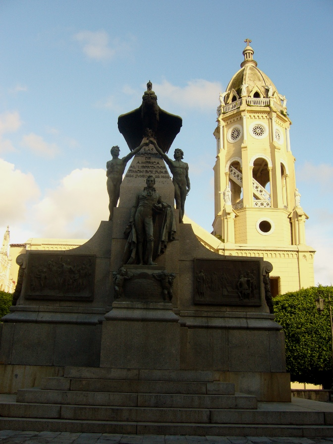 Casco Antiguo de Panamá